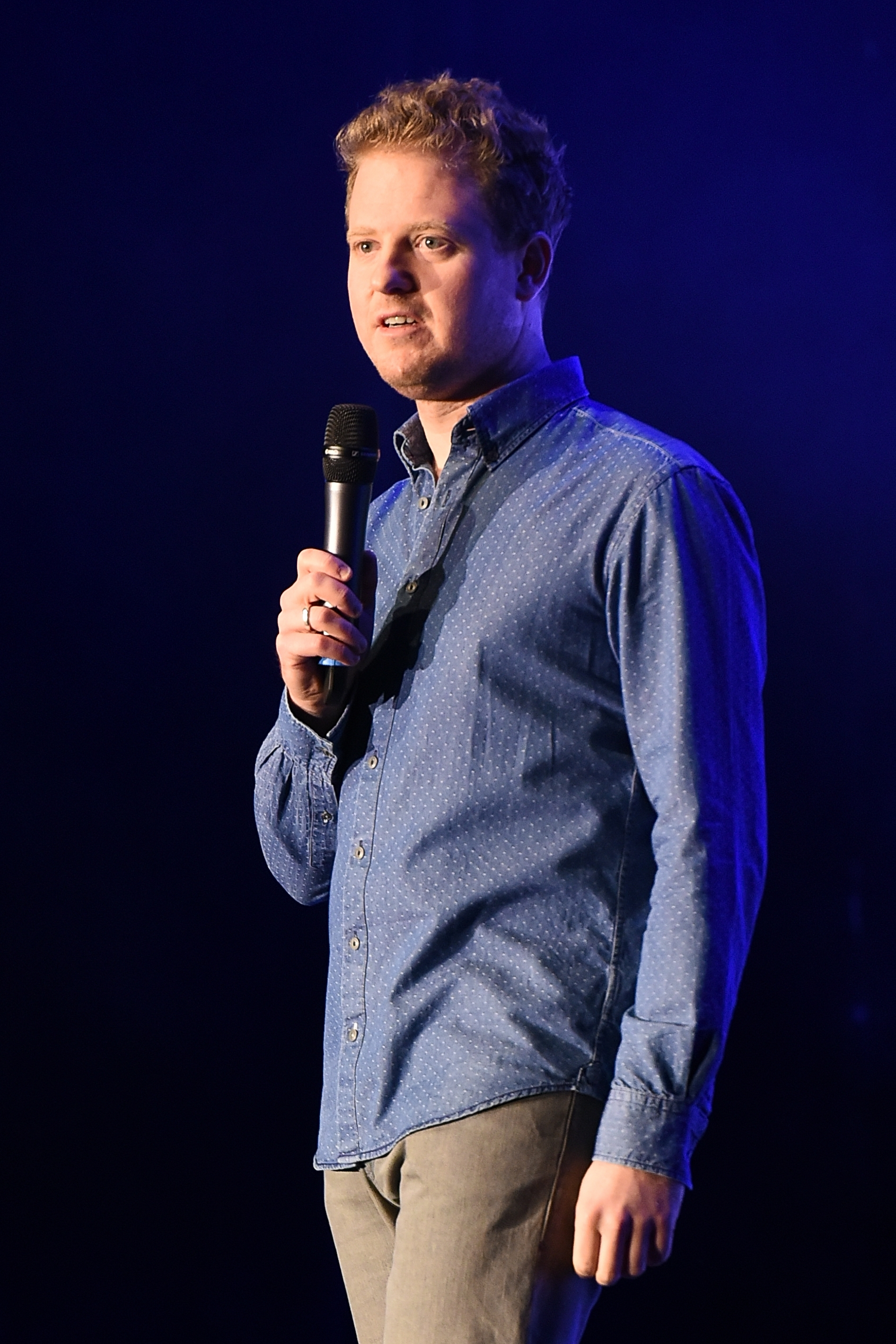 Martin Zingsheim bei Tegtmeiers Erben 2015 im Kulturzentrum Herne.